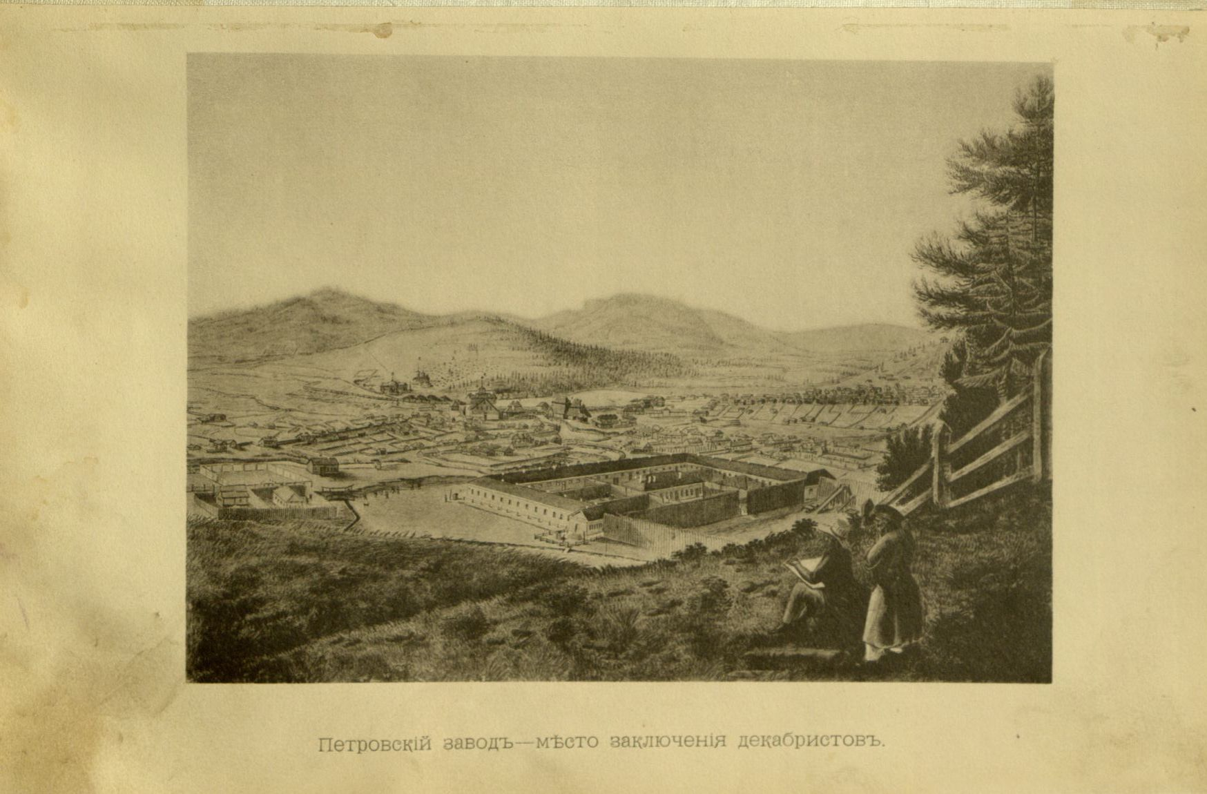 Головачев, П. М. Декабристы : 86 портретов, вид Петровского завода и 2 бытовых рисунка того времени. - М., [1906]